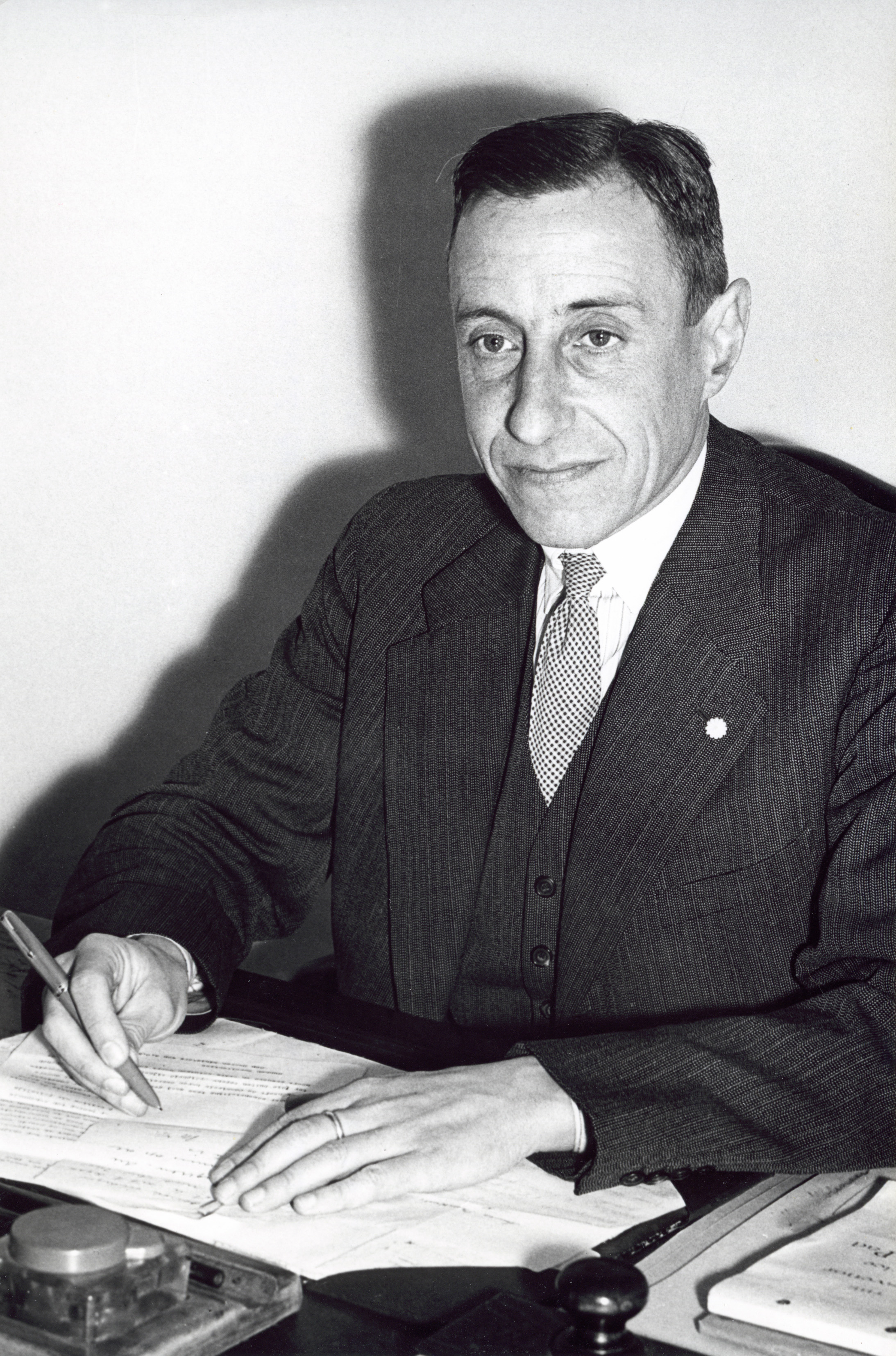 Prof. dr. J.E. de Quay (1901-1985). Jan Eduard de Quay, KVP-Politicus. 27-03-1959.